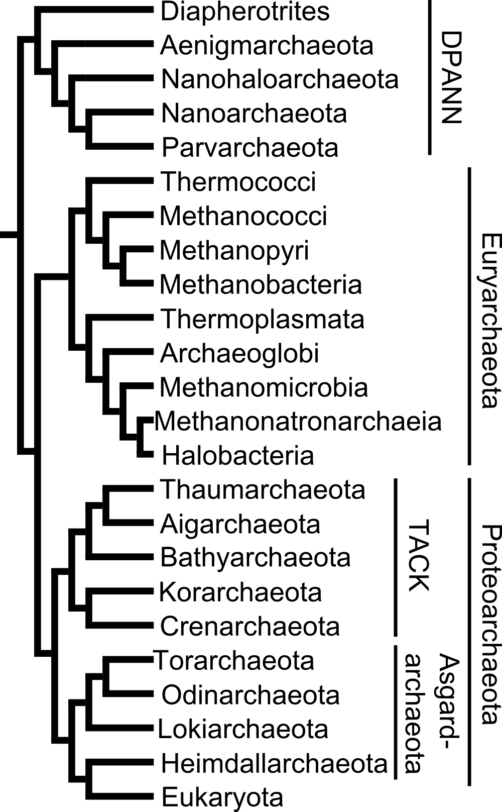 タイトル通り